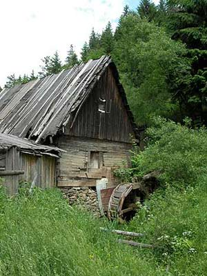 moara de apa din Bistra,Alba